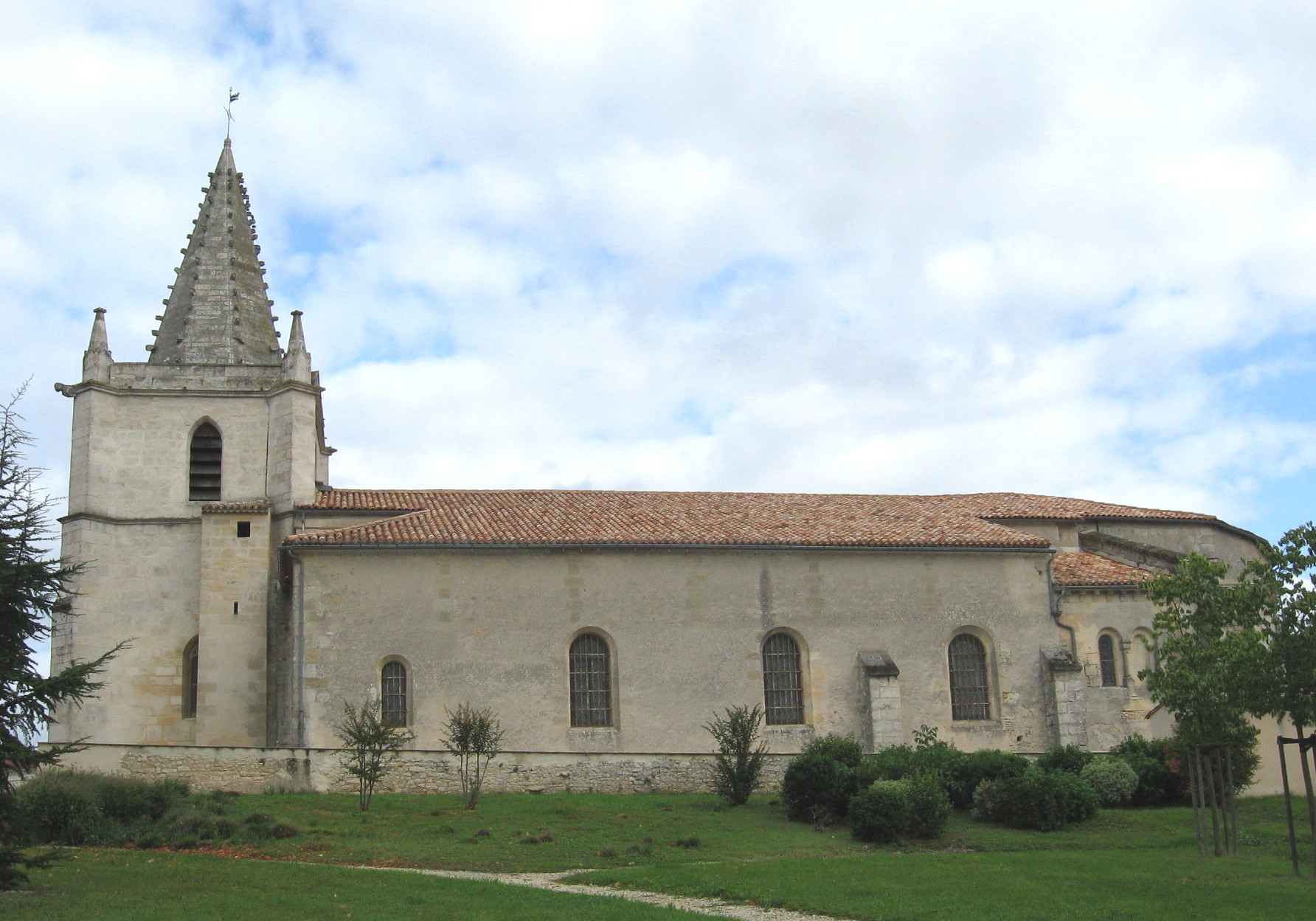 Tour-clocher 16e s, nef remaniée au 19e s, abside 12e s. Vue du sud. ISMH 2004 et CMH 1925. .